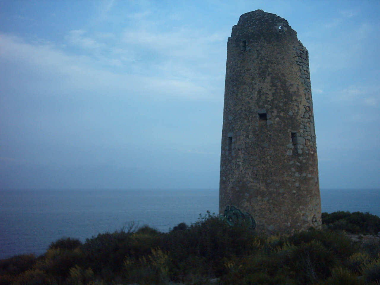 Torre de la Corda (Orpesa)